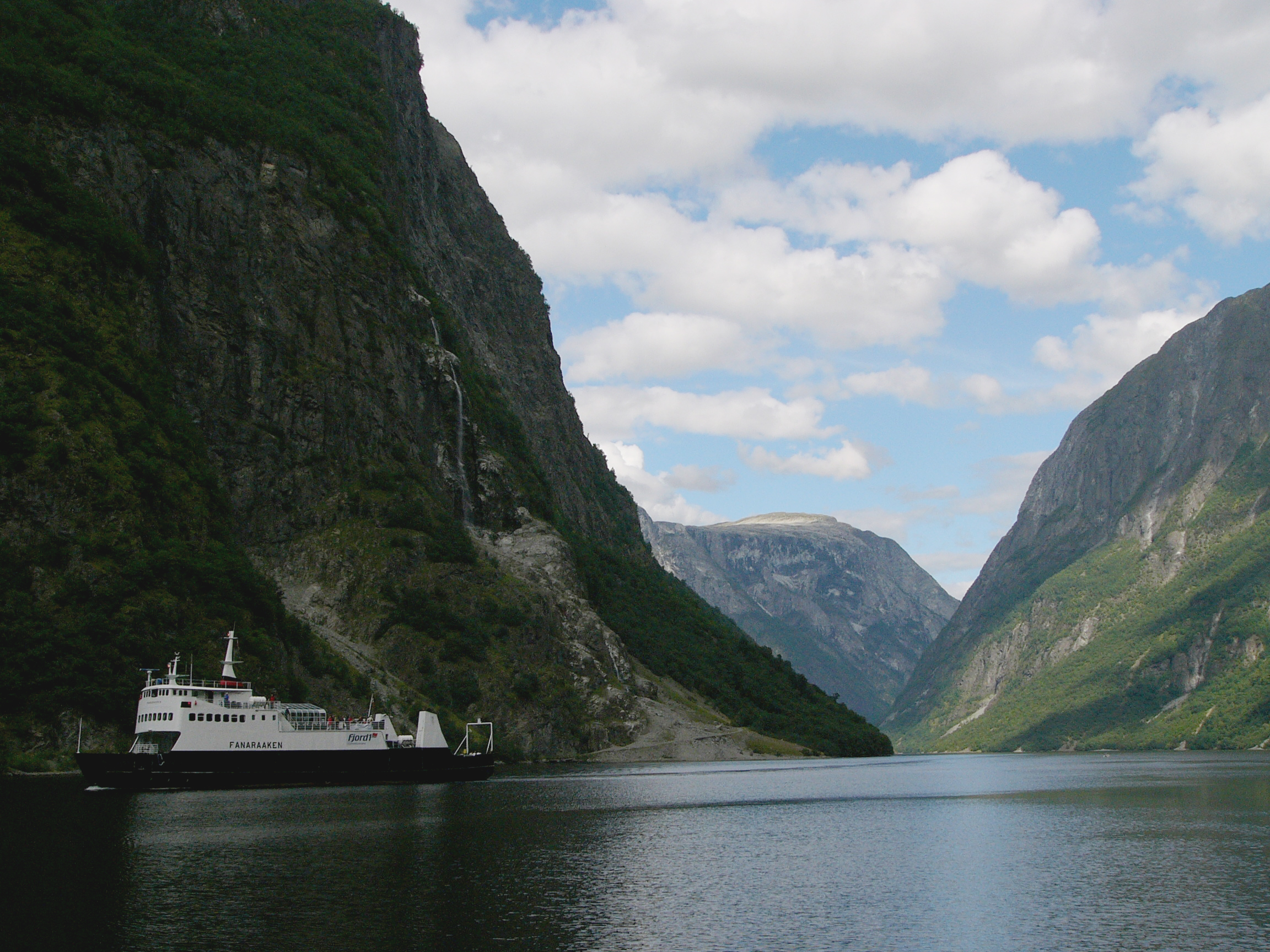 MF Fanaraaken på veg mot kai i Gudvangen